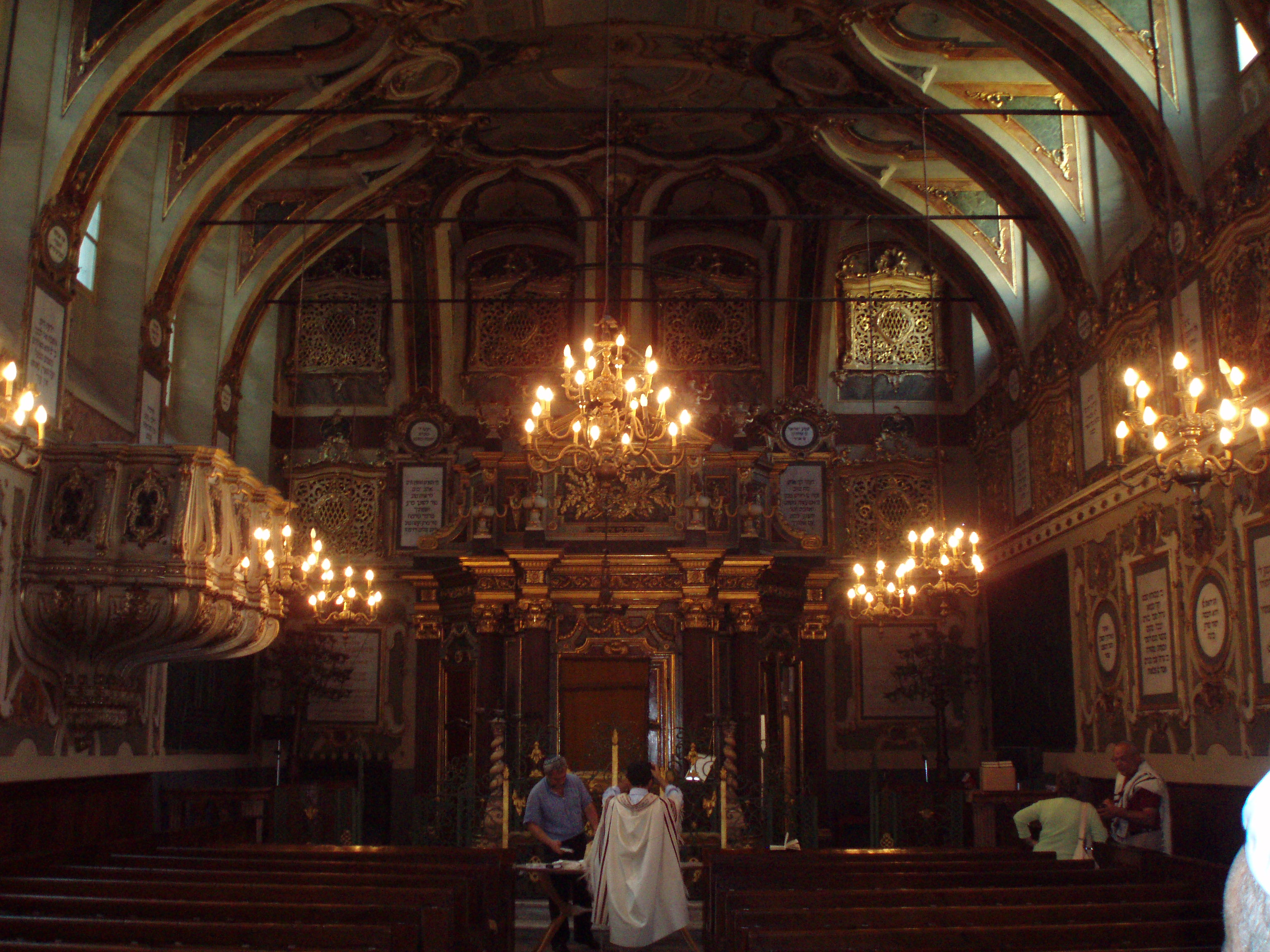 Synagogue of Casale Monferrato: interior